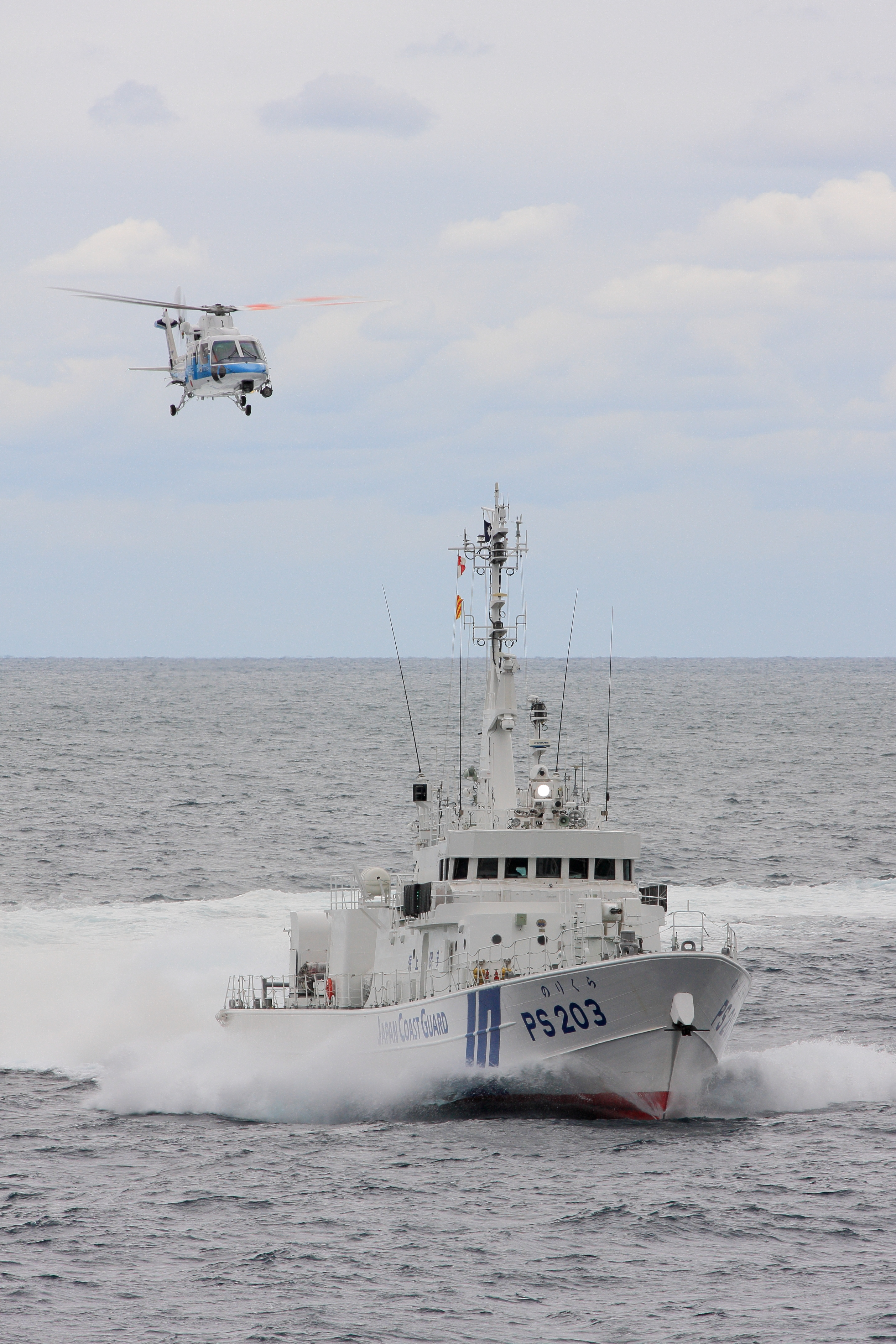 新潟沖で撮影された、海上保安庁第九管区海上保安本部のPS203のりくらとJA909Aらいちょう